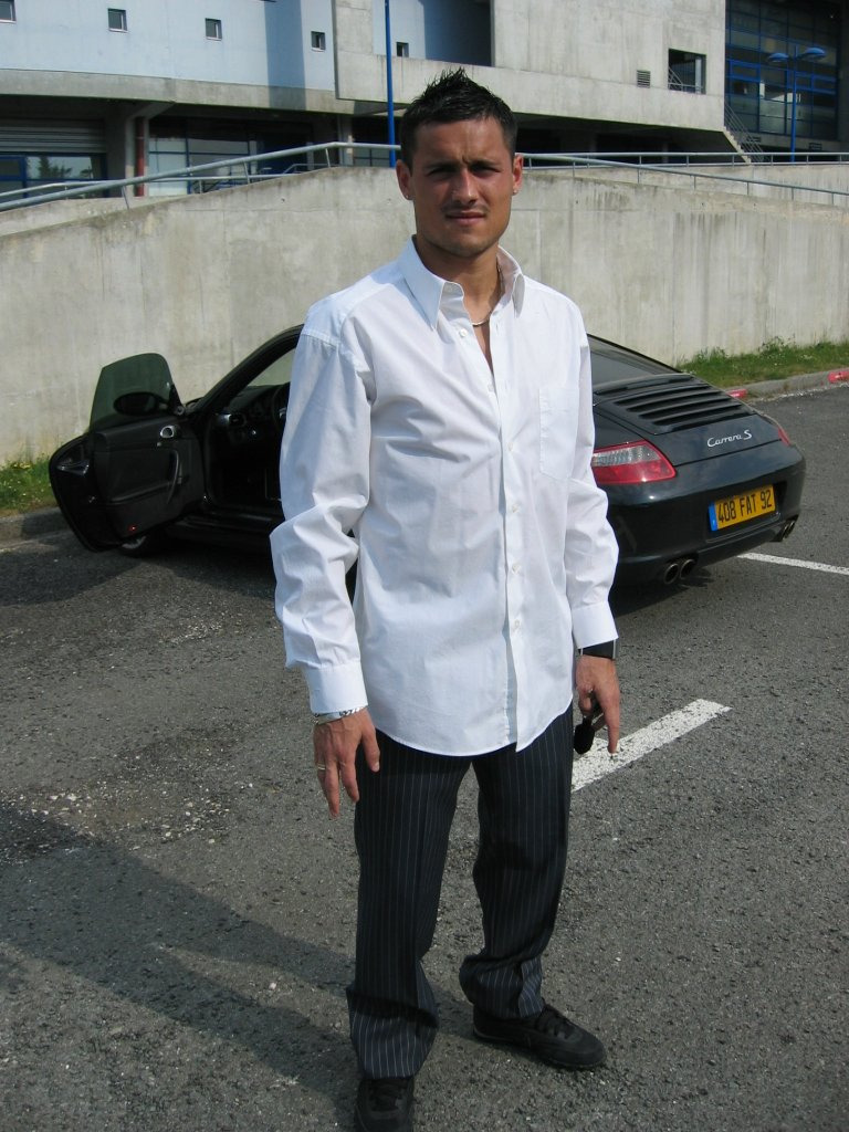 Karim_Ziani - djbar